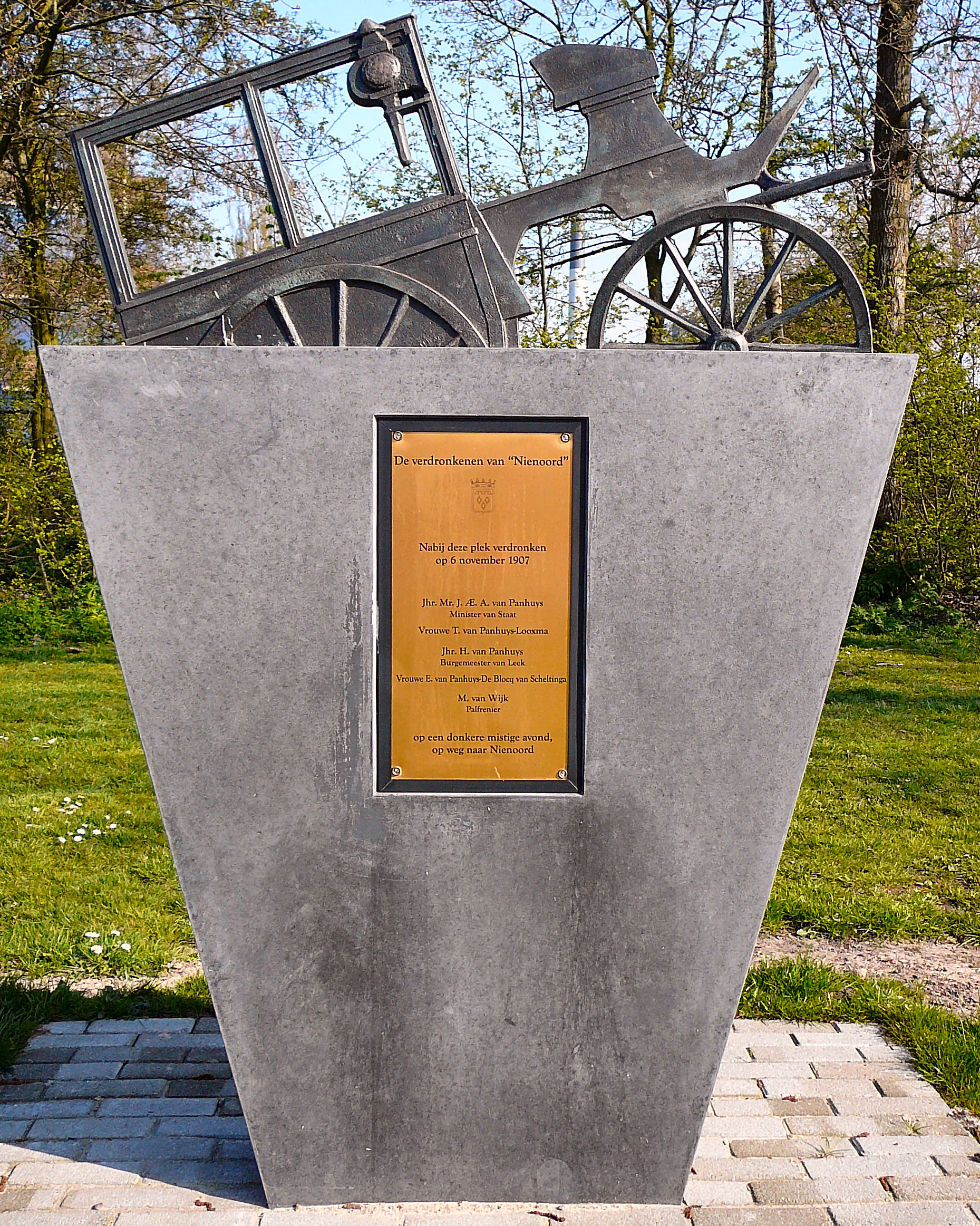 Monument De verdronkenen van "Nienoord". Made by Jikke Jager in 2003